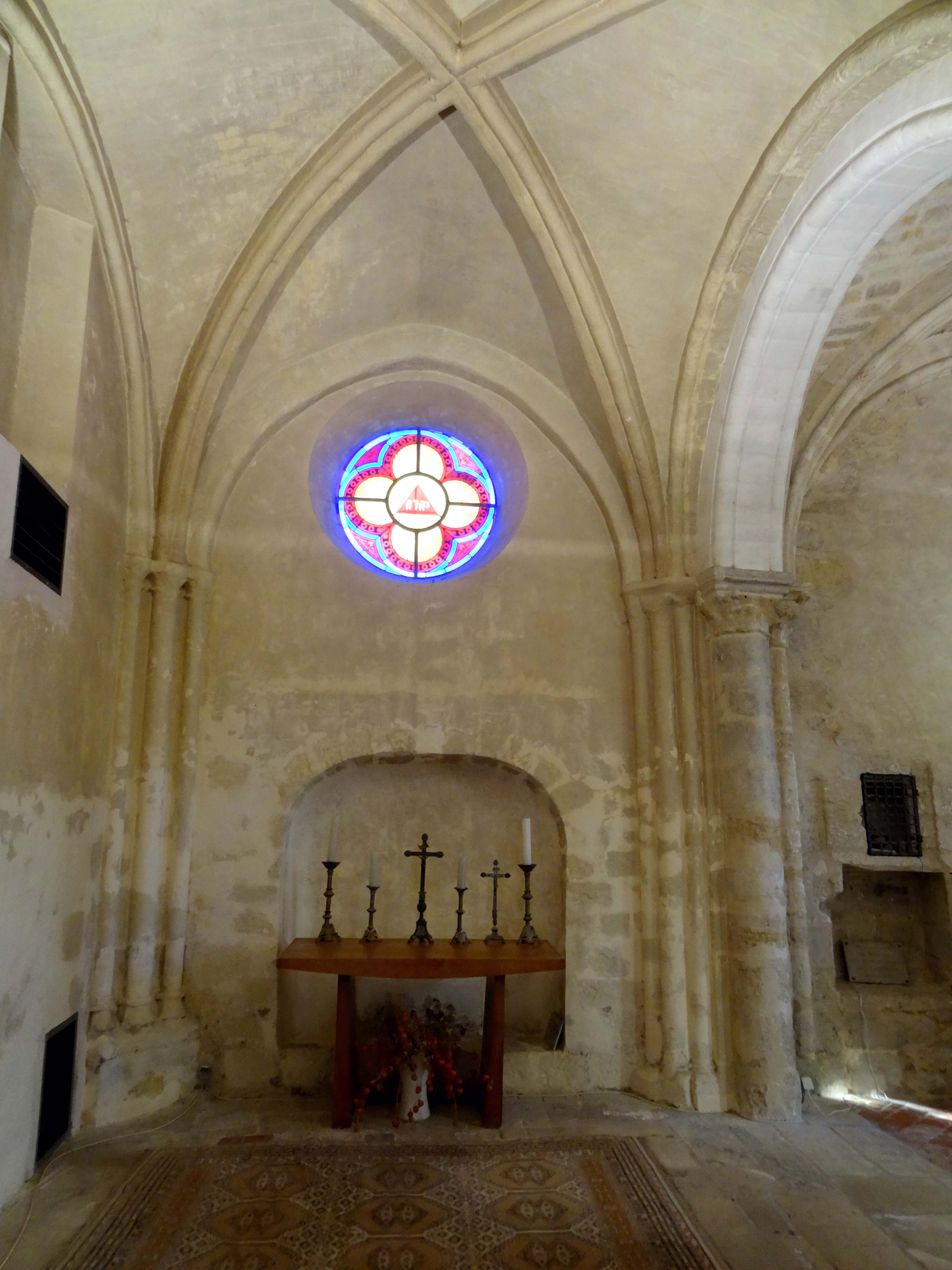 Intérieur de l'église - voir titre.